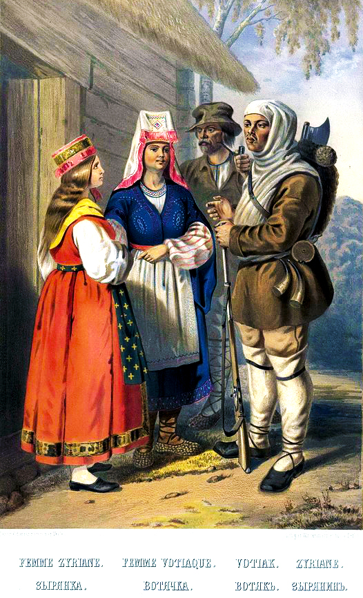 Зыряне и вотяки. Этнографическое описание народов России Густава-Федора Христиановича Паули